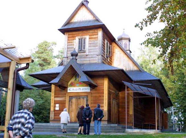 Grabarka. Cerkiew odbudowana po pożarze z 1990 roku.